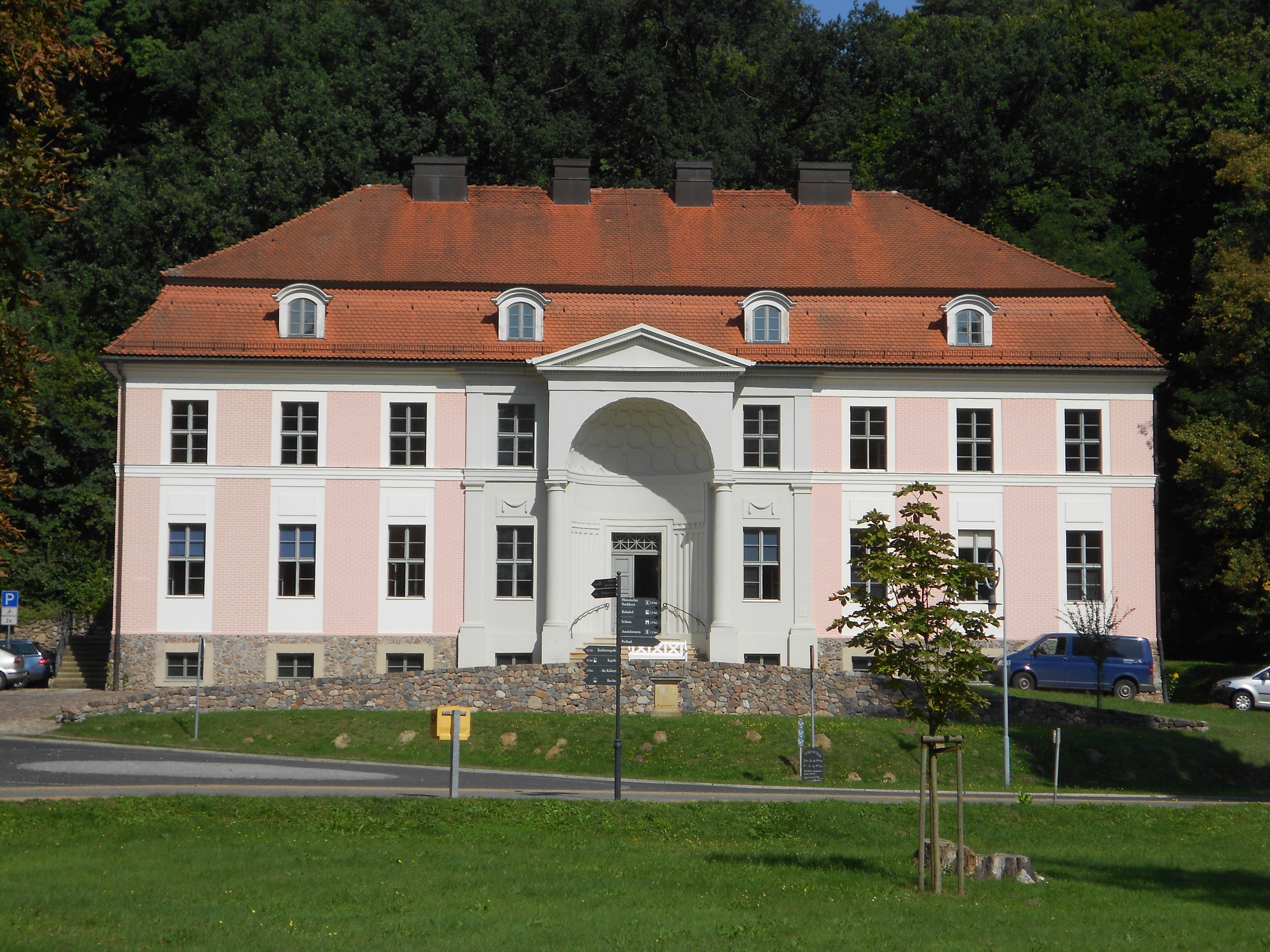 Fachklinik und Moorbad Bad Freienwalde